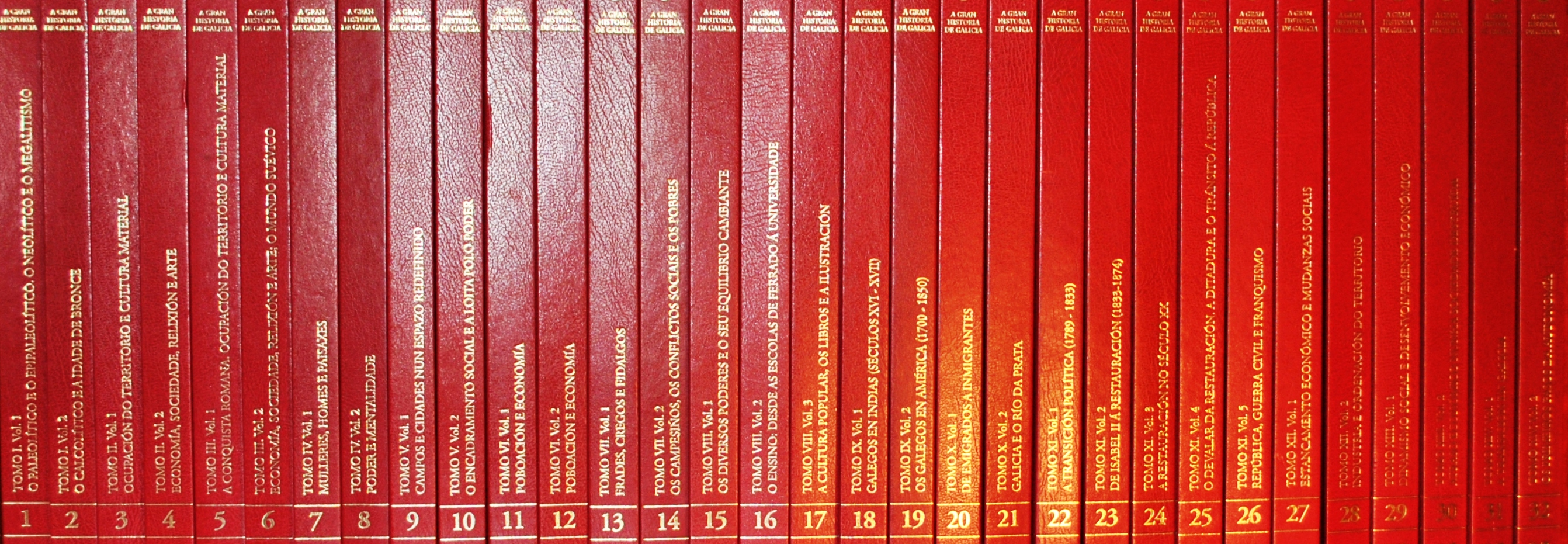 A gran historia de Galicia, lombos